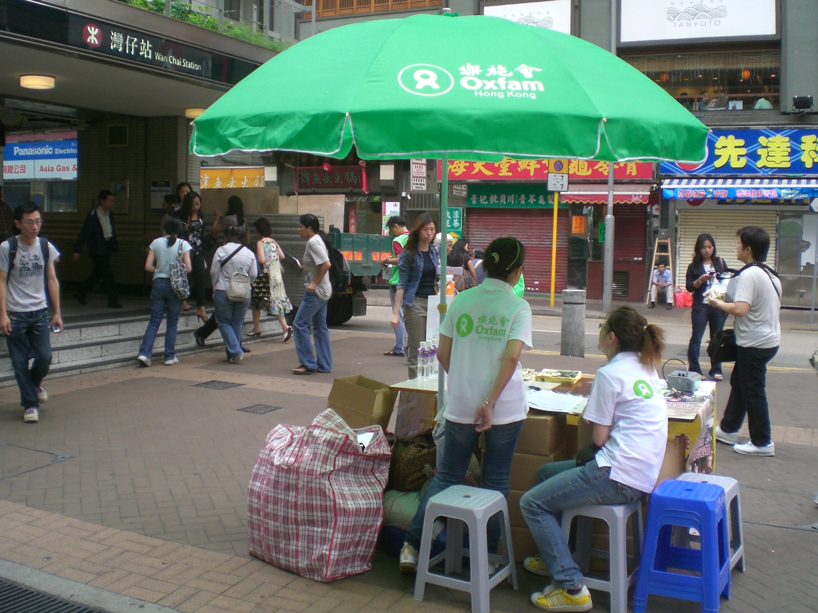 樂施會籌款 @ 灣仔站A3出口